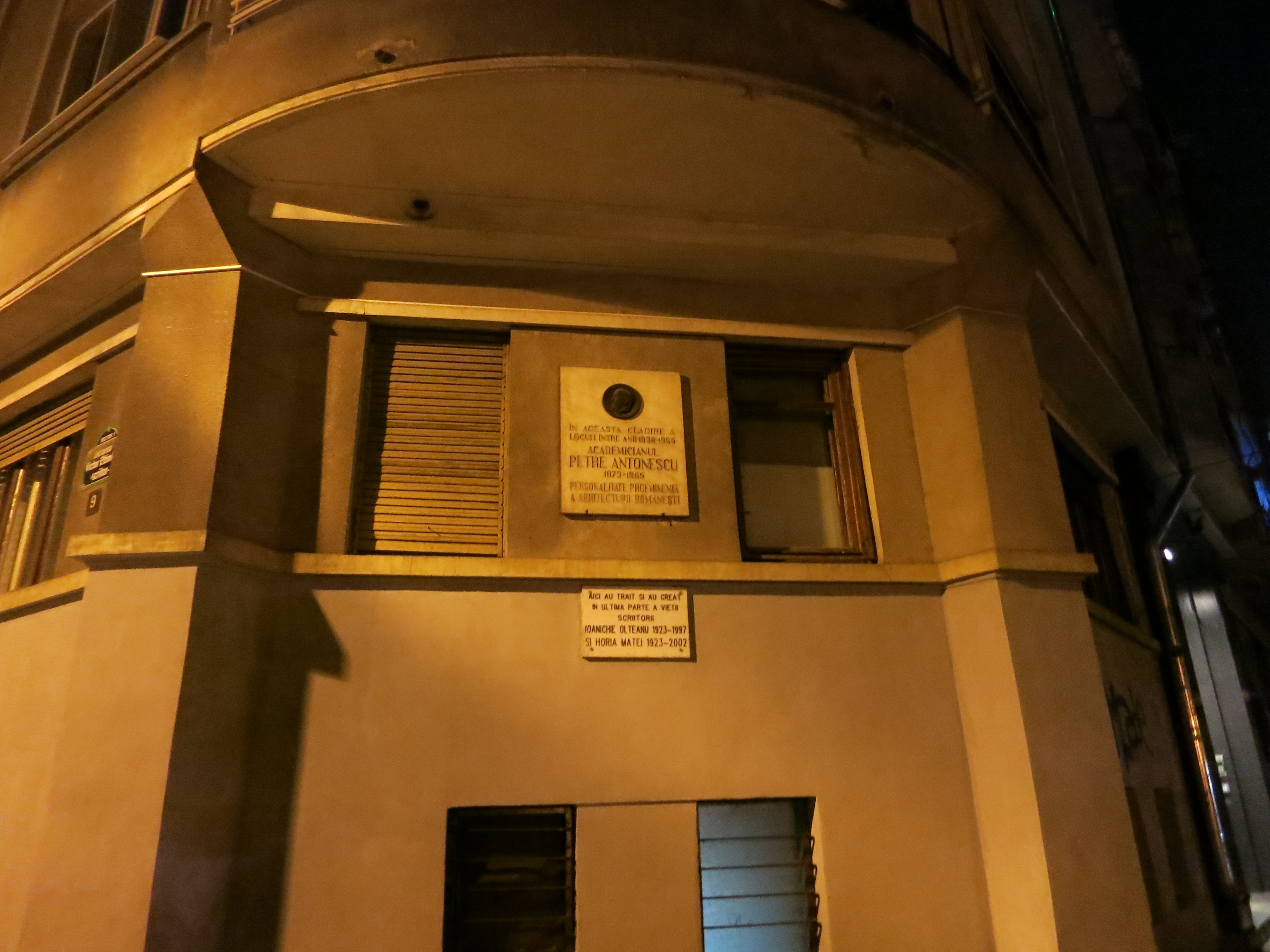 Imobil în care au locuit arh. Petre Antonescu și Victor Eftimiu municipiul București, Intr. Eftimiu Victor 9, sector 1 prima jum. sec. XX